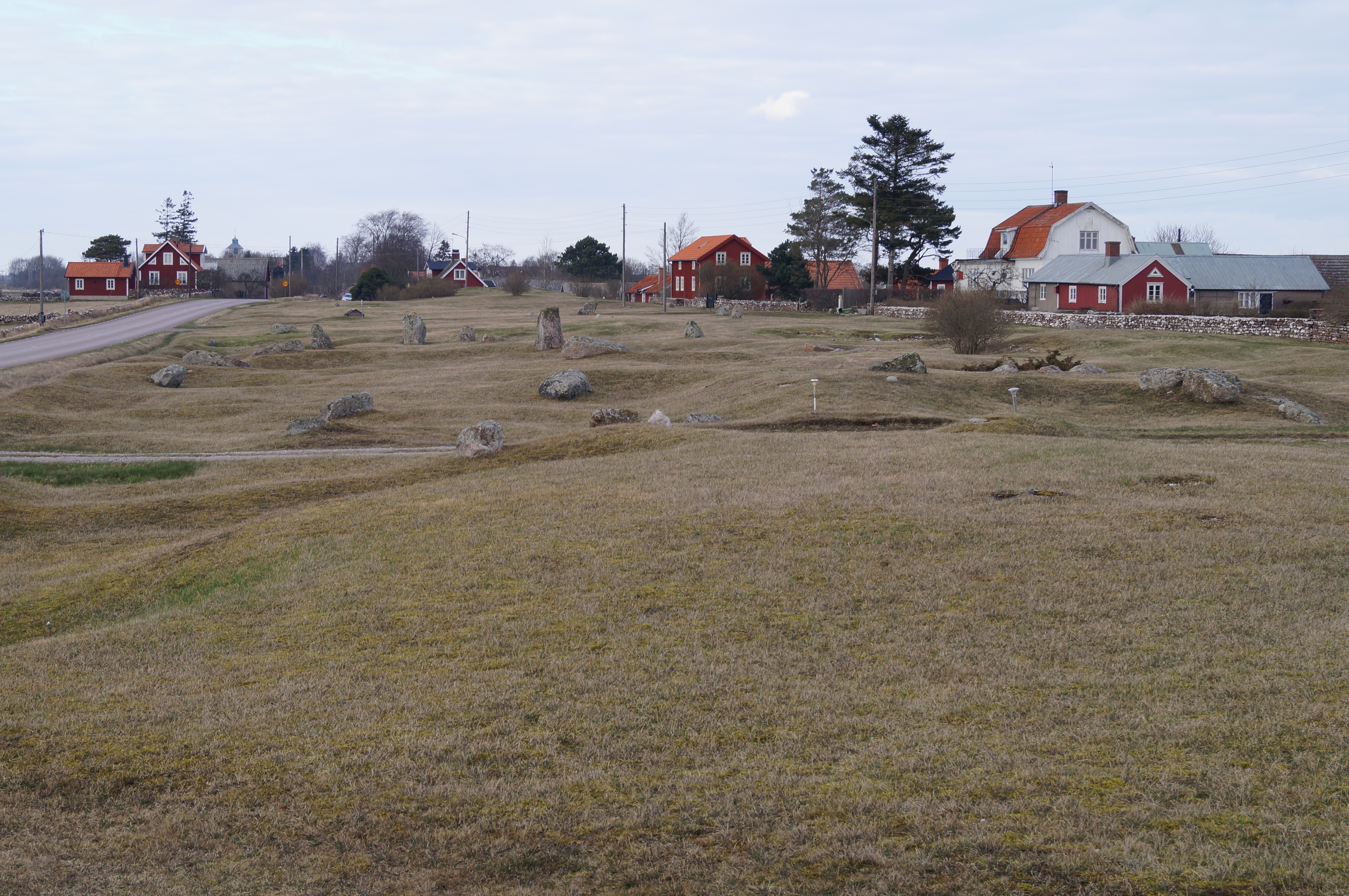 Hulterstad (Hulterstad 86:1) gravfält har 265 gravar. Här finns runda stensättningar, rektangulära stensättningar, högar, resta stenar, klumpstenar samt kantställda kalkstensflisor. Material finns från stenålder, bronsålder samt järnålder.